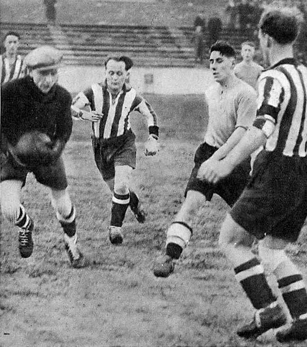 De Match Jeunesse géint de Racing Club de Paris, 16. Februar 1935. Original caption: "DIE ESCHER JEUNESSE IN PARIS -- Am 16. Februar spielte Jeunesse in Paris gegen eine starke Mannschaft des racing Club und schloss ehrenvoll mit 2:2 ab Unsere Bilder zeigen die Jeunesse-Mannschaft und einige interessante Spielphasen."